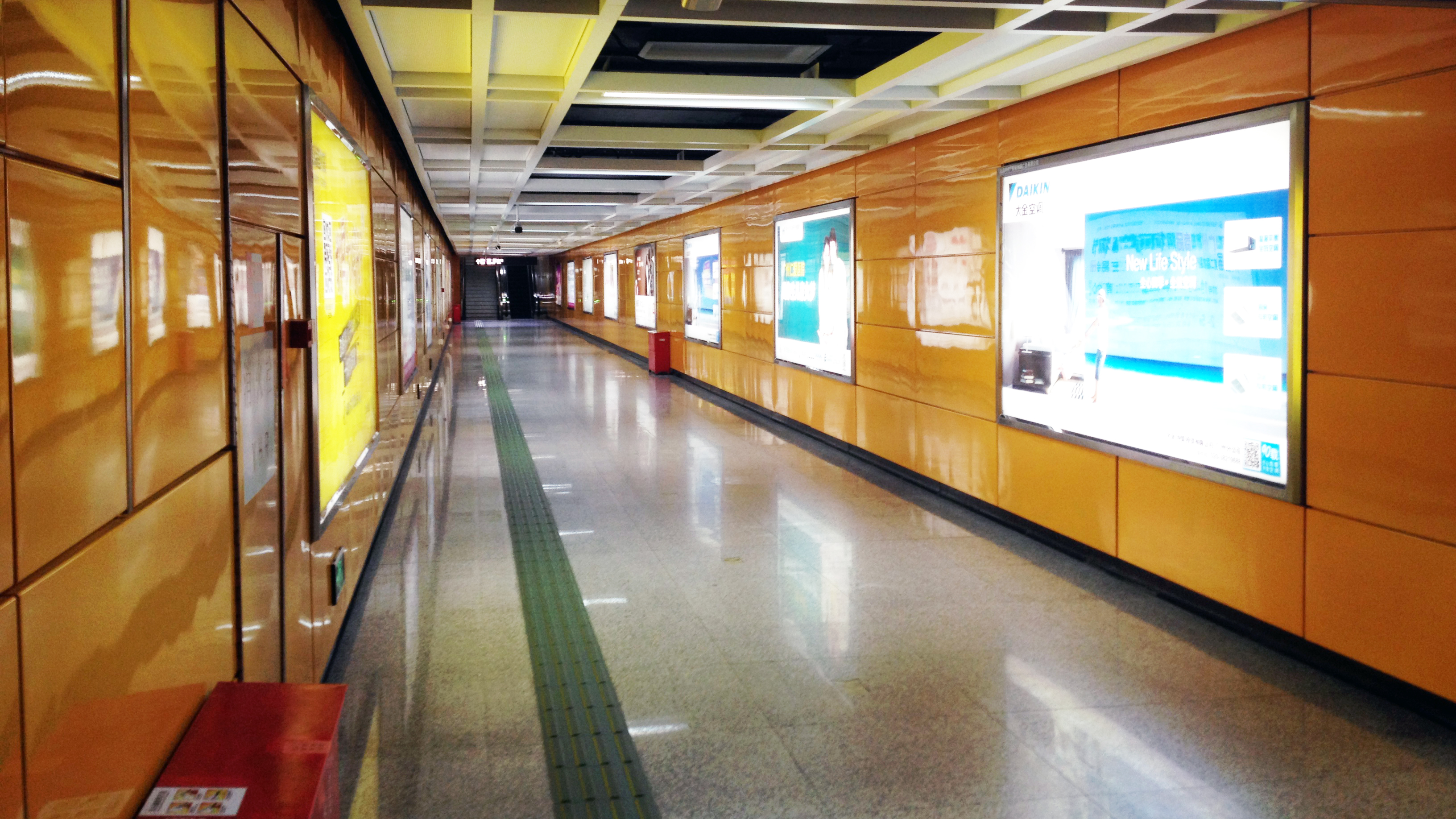 广州地铁西场站非付费区的过街通道